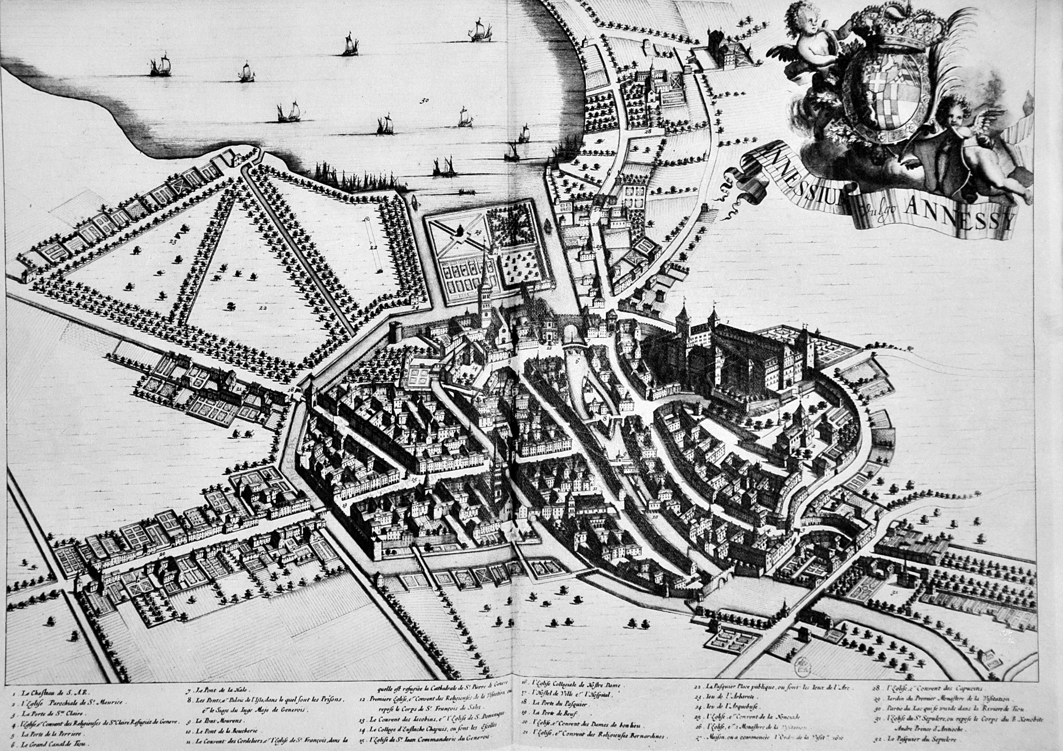 Plan d'Annecy à la fin du avec la description des différents édifices.